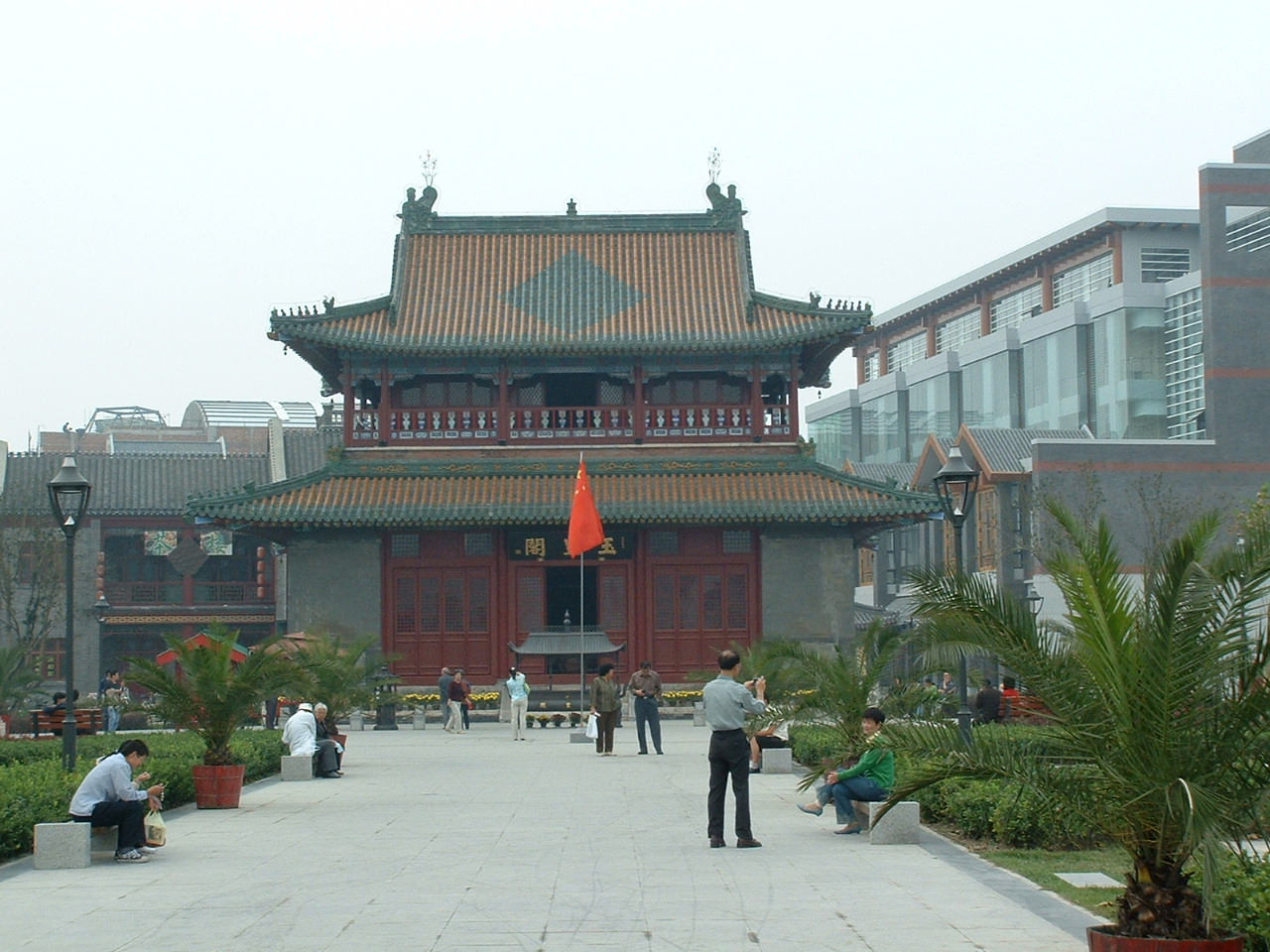 海河畔玉皇阁